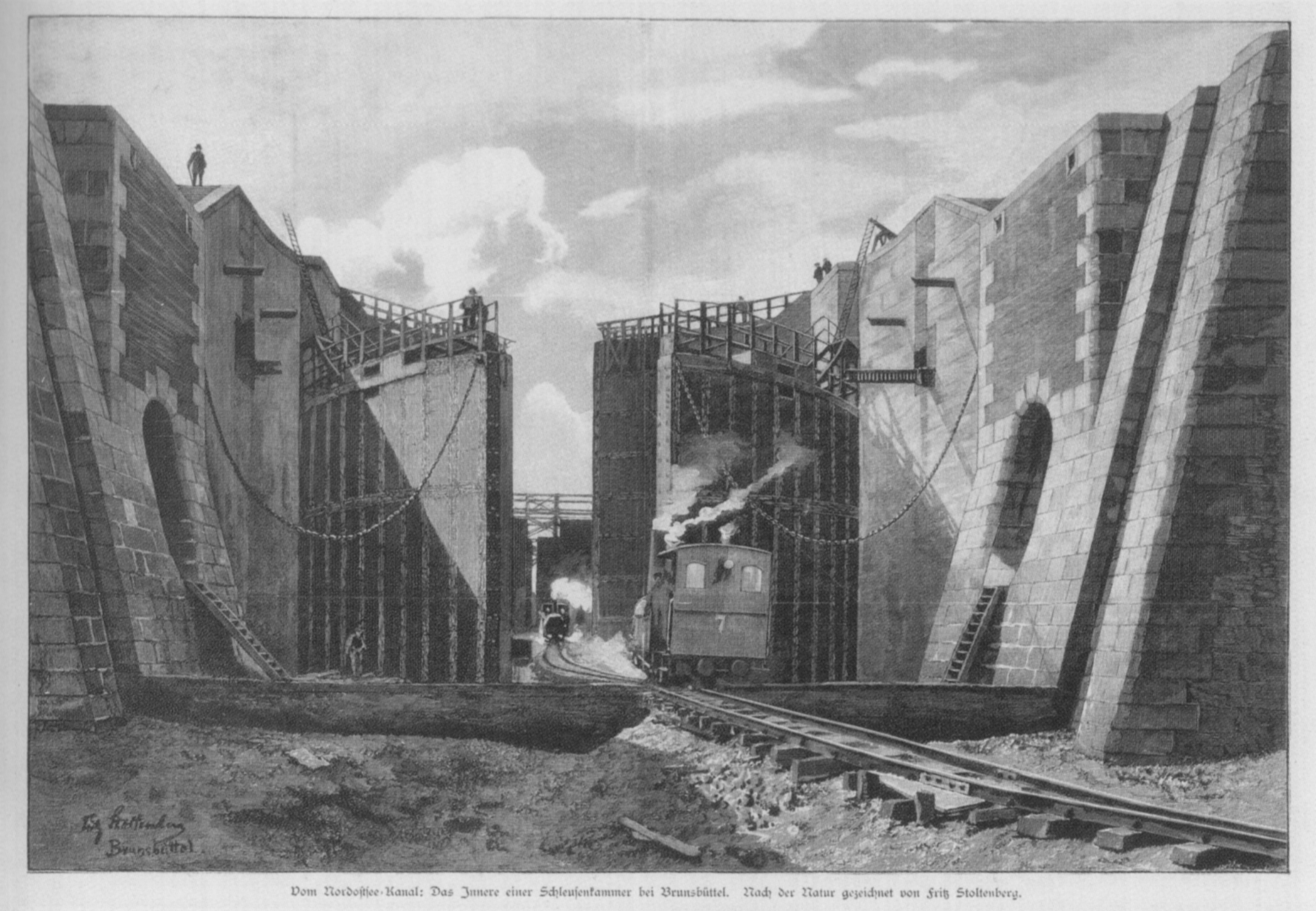 Bau des Nord-Ostsee-Kanals, Bau der Schleusenkammer in Brunsbüttel, Holzstich und Zeitschriftenillustration von Fritz Stoltenberg